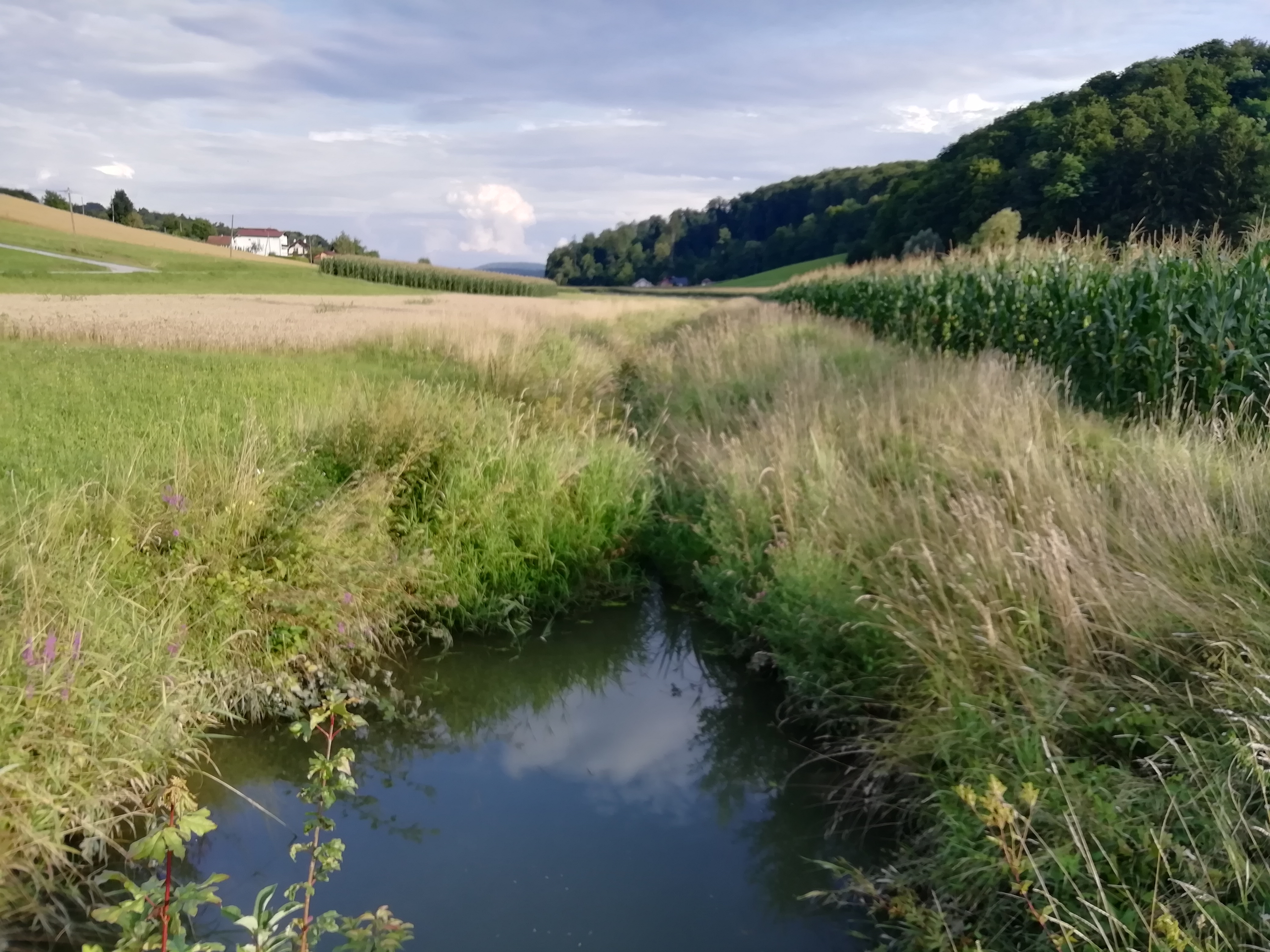 Struga potoka Gačnik